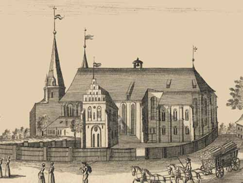 Bardowicker Dom 1720